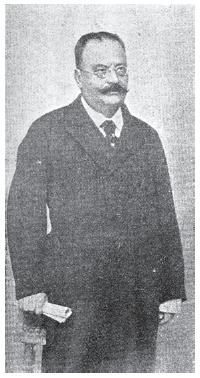 Димитър Македонски от Емборе, Кайлярско, днес Гърция, учител и деец на ВМОК